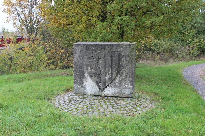 Gedenkstein Oberauer Tunnel